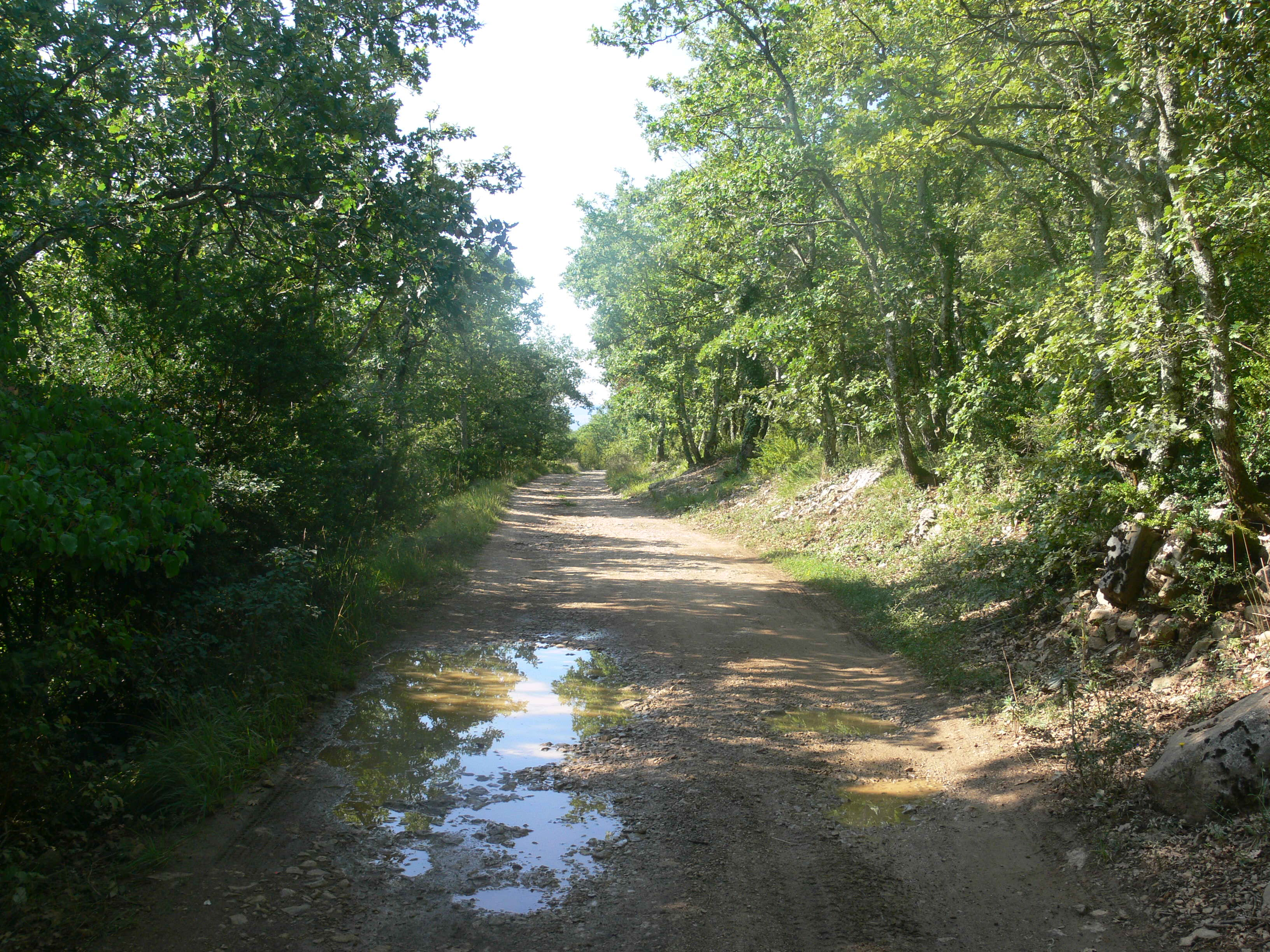 Chemin entre Saint-Julien-en-Saint-Alban et Le Pouzin, sur le plateau des Grads